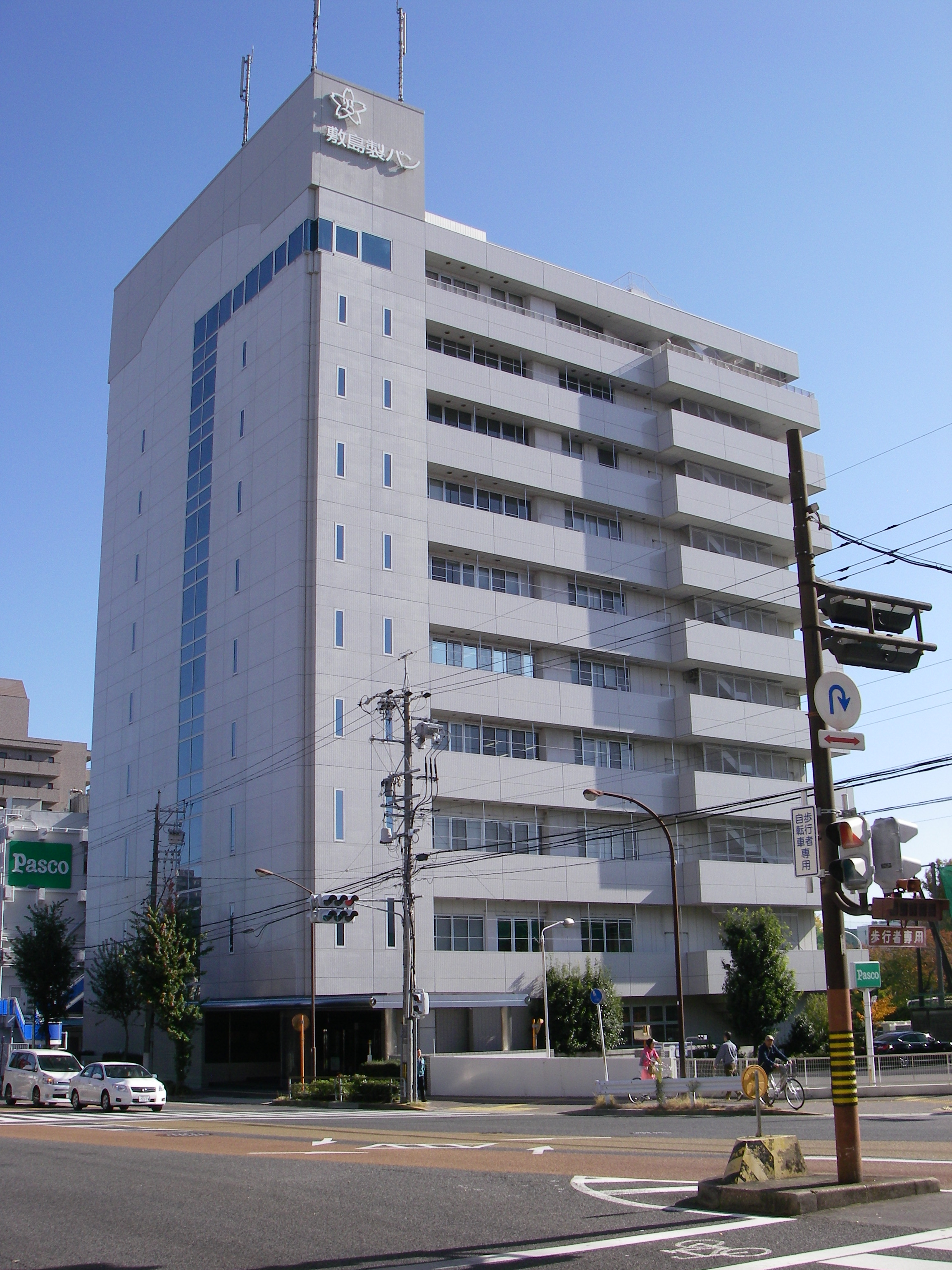 敷島製パン株式会社本社（名古屋市東区白壁五丁目）